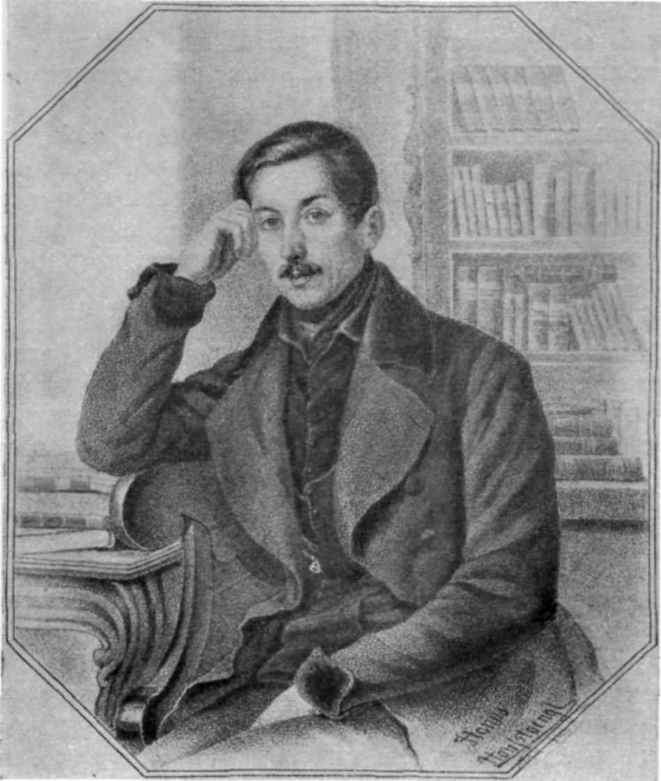 С.Д. Полторацкий. 1846 г.